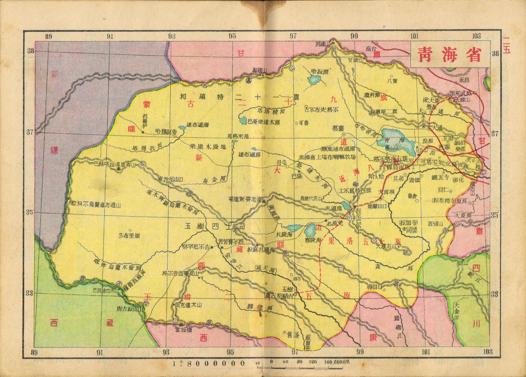 亚新地学社1936年《袖珍中华全图》青海省